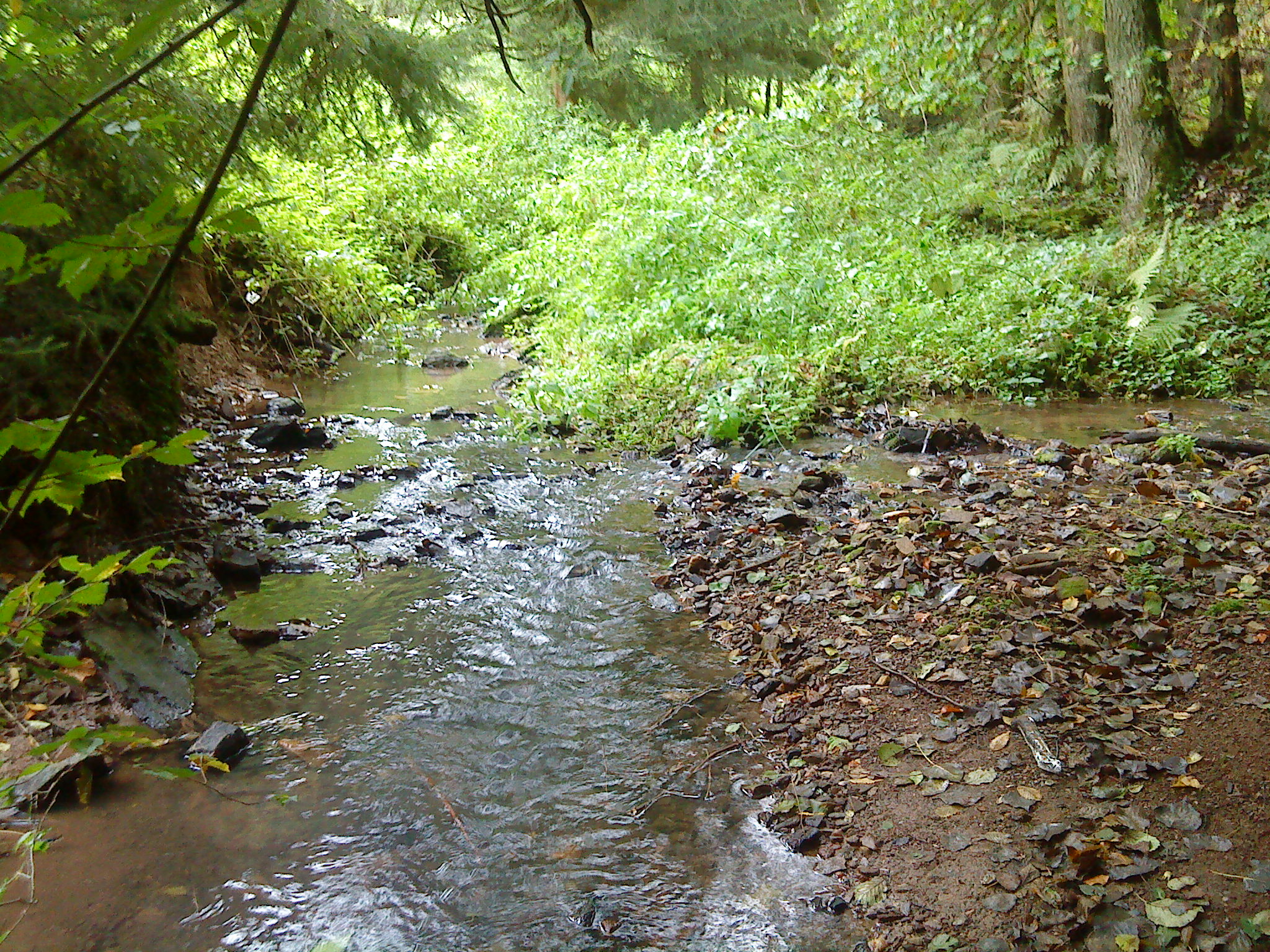 Der Falkenbach (rechts) mündet in den Omersbach (hinten), bei Geiselbach im Teufelsgrund